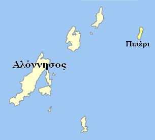 Η θέση της νήσου Πιπέριστο χάρτη